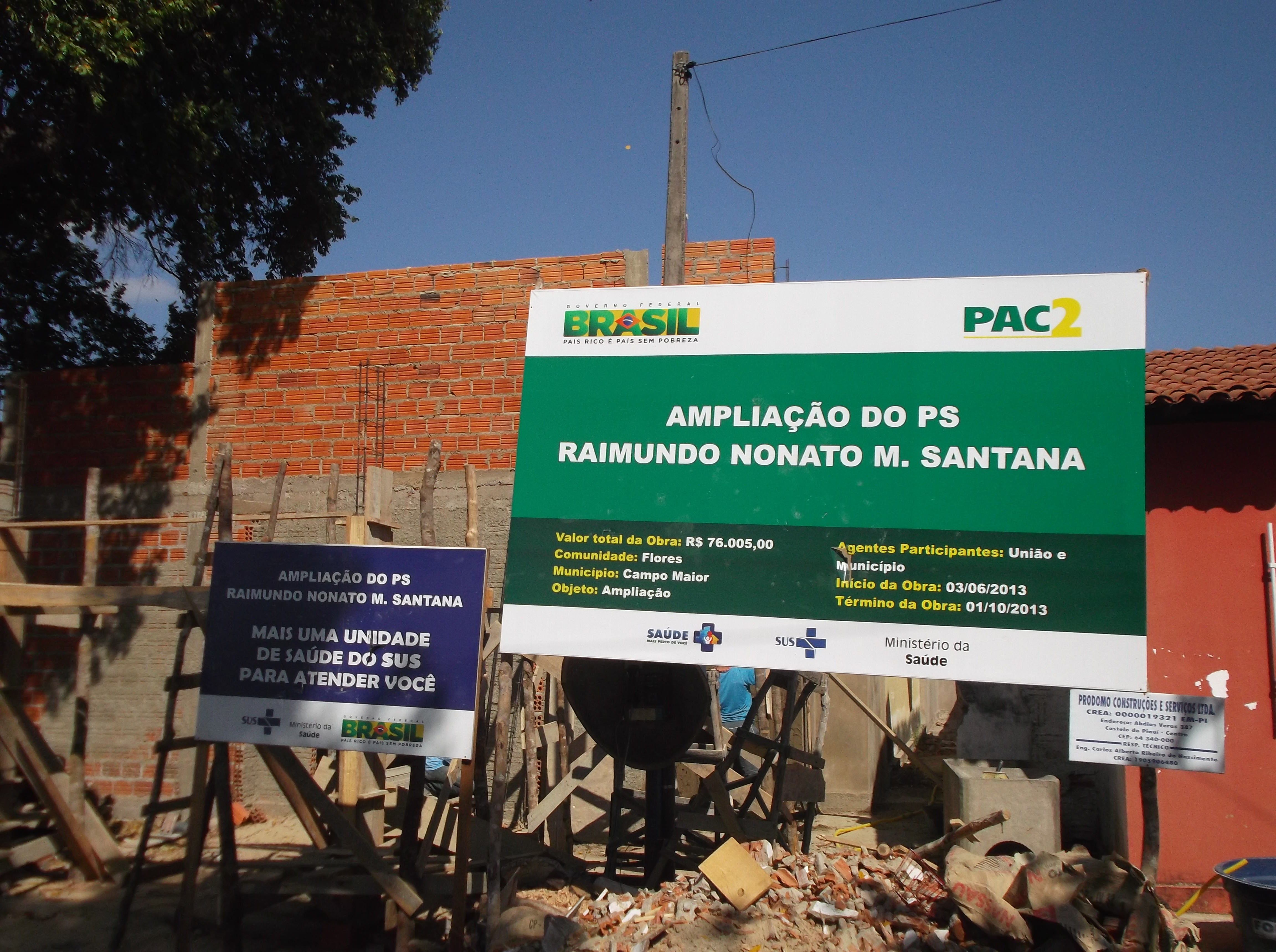 Placa de identificação de Obra com recursos do PAC2 em uma obra de um posto de Saúde no Piauí.